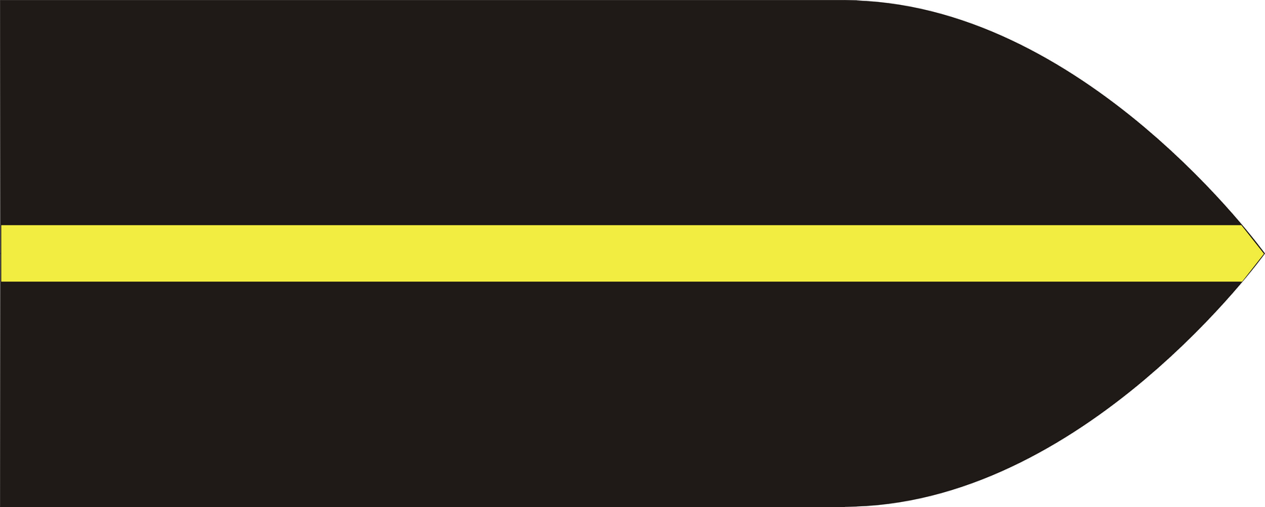 Barwy oddziału topograficznego 2 Dywizji Strzelców Pieszych Polskich Sił Zbrojnych na Zachodzie